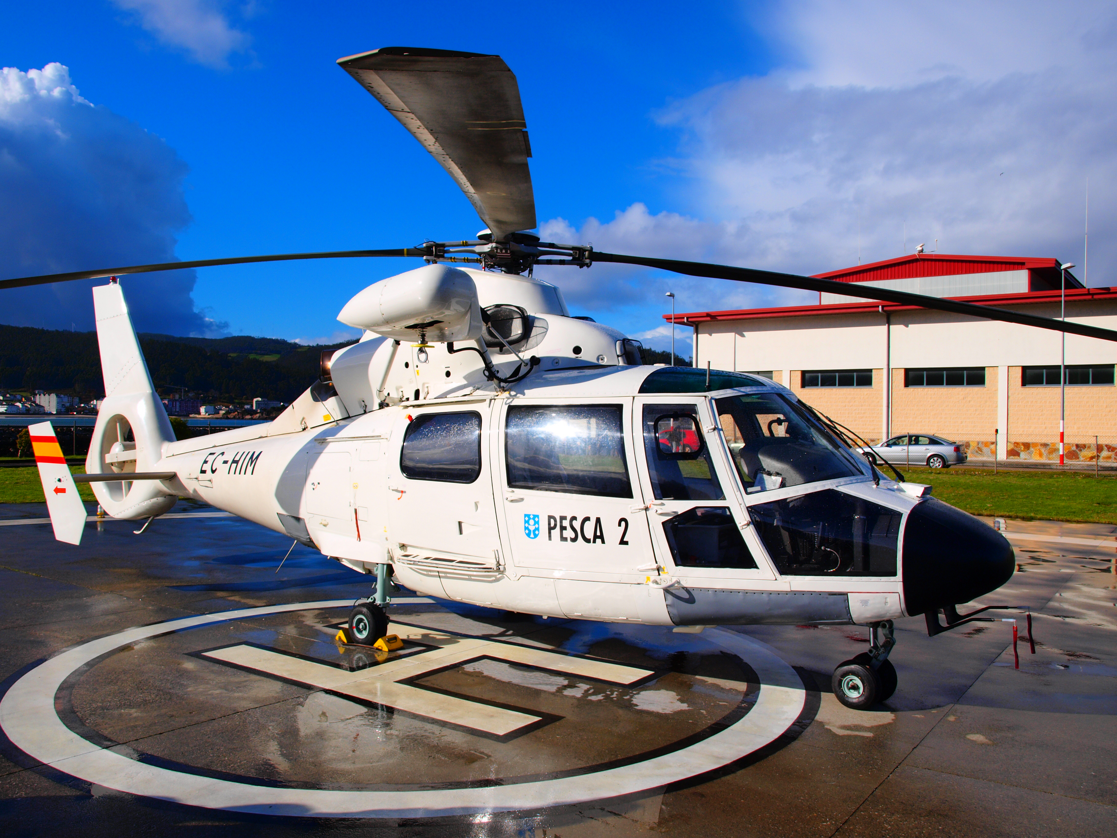 Sobre la plataforma del helipuerto.